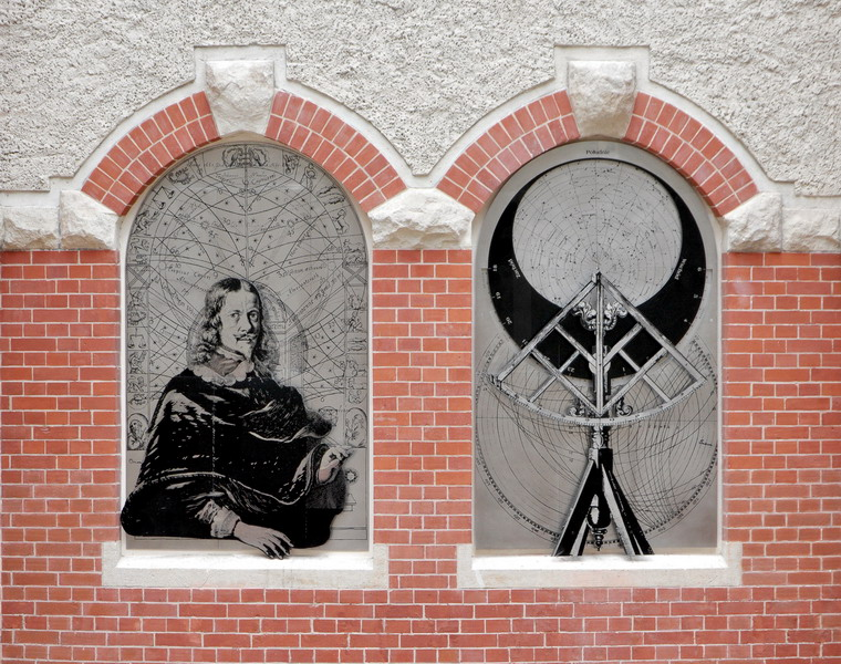 Relief z wizerunkiem Jana Heweliusza autorstwa Roberta Kai na jednym z dziedzińców Politechniki Gdańskiej. Gmach główny.